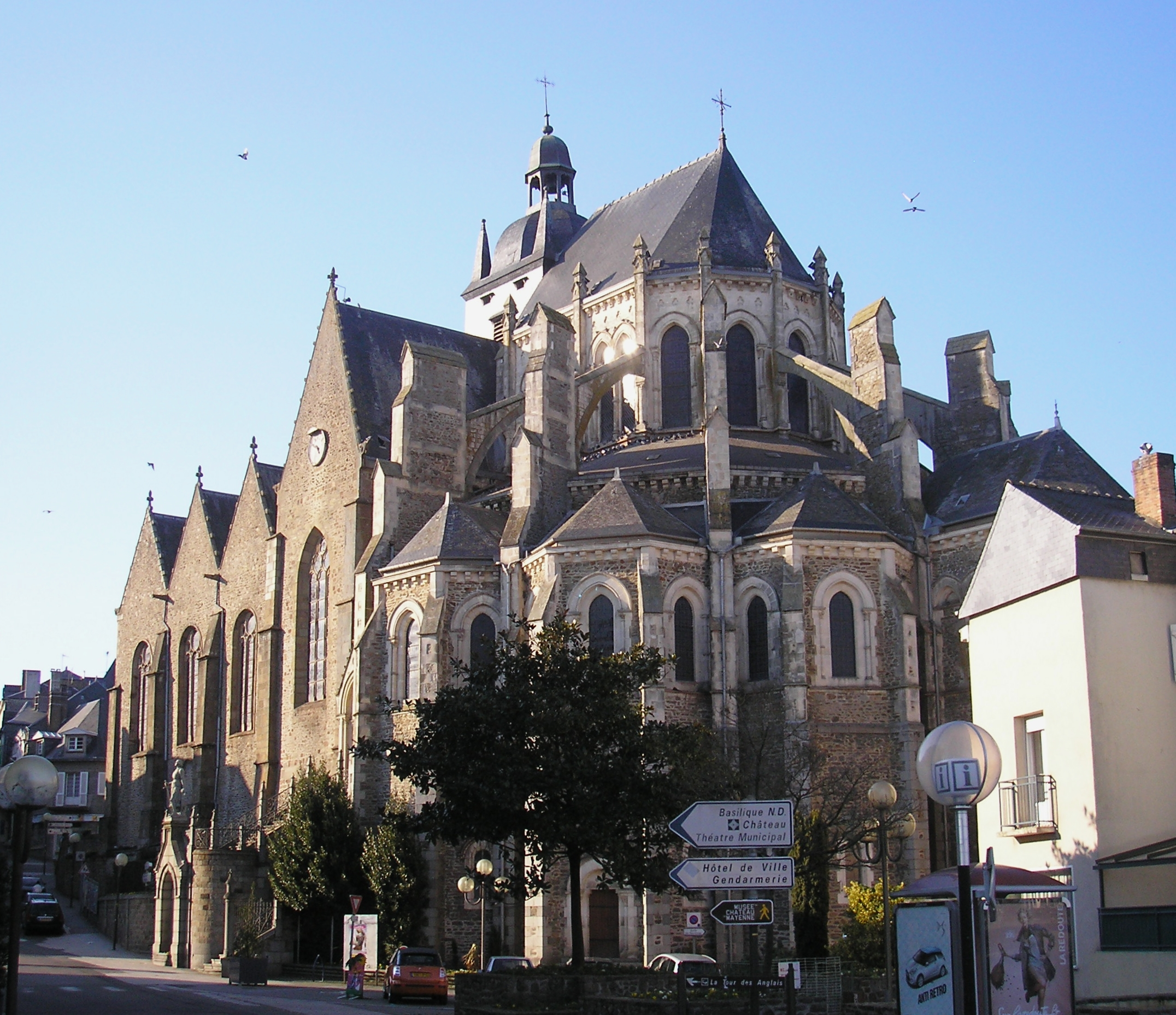 Mayenne (Pays de la Loire, France). La basilique Notre-Dame.